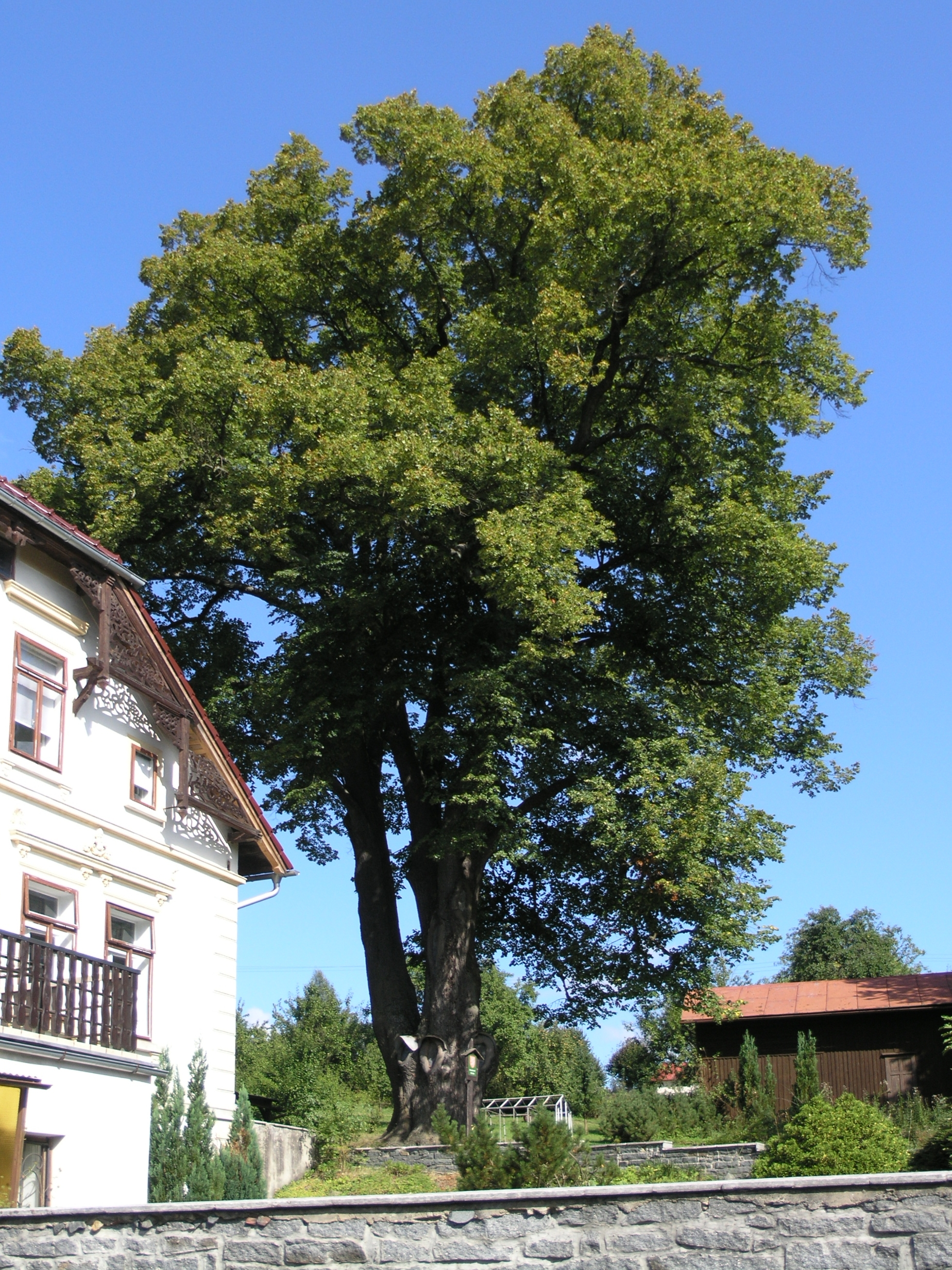 Brtníky - památná lípa malolistá (výška 25 metrů, obvod kmene 605 cm, stáří 280 let)